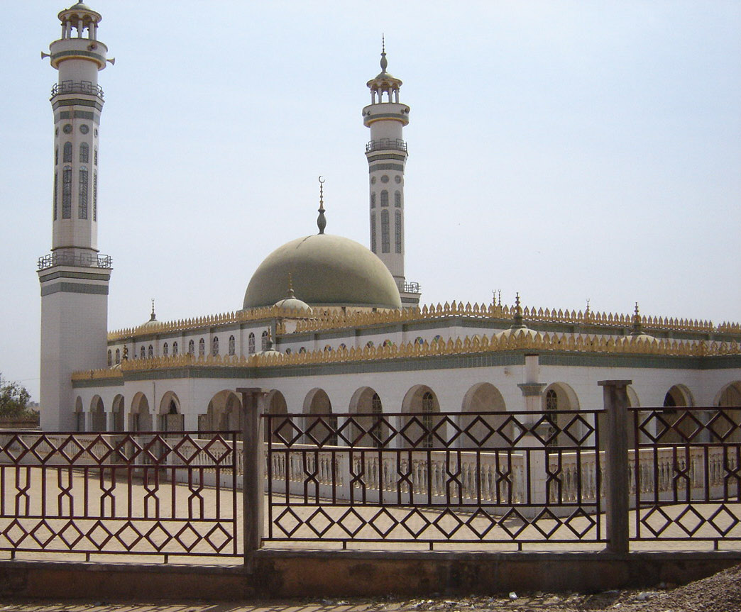 N'Gaoundere Lamido Grand Mosque